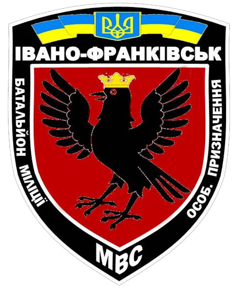 Емблема батальйону МВС «Івано-Франківськ».